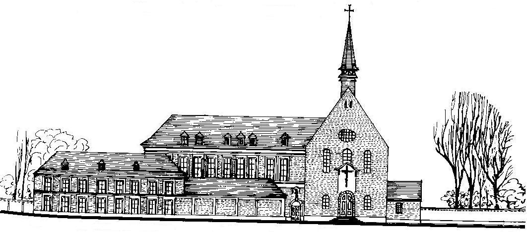 Ancien Collège de Tourcoing vers le milieu du XVIIIe siècle,(reconstitution).